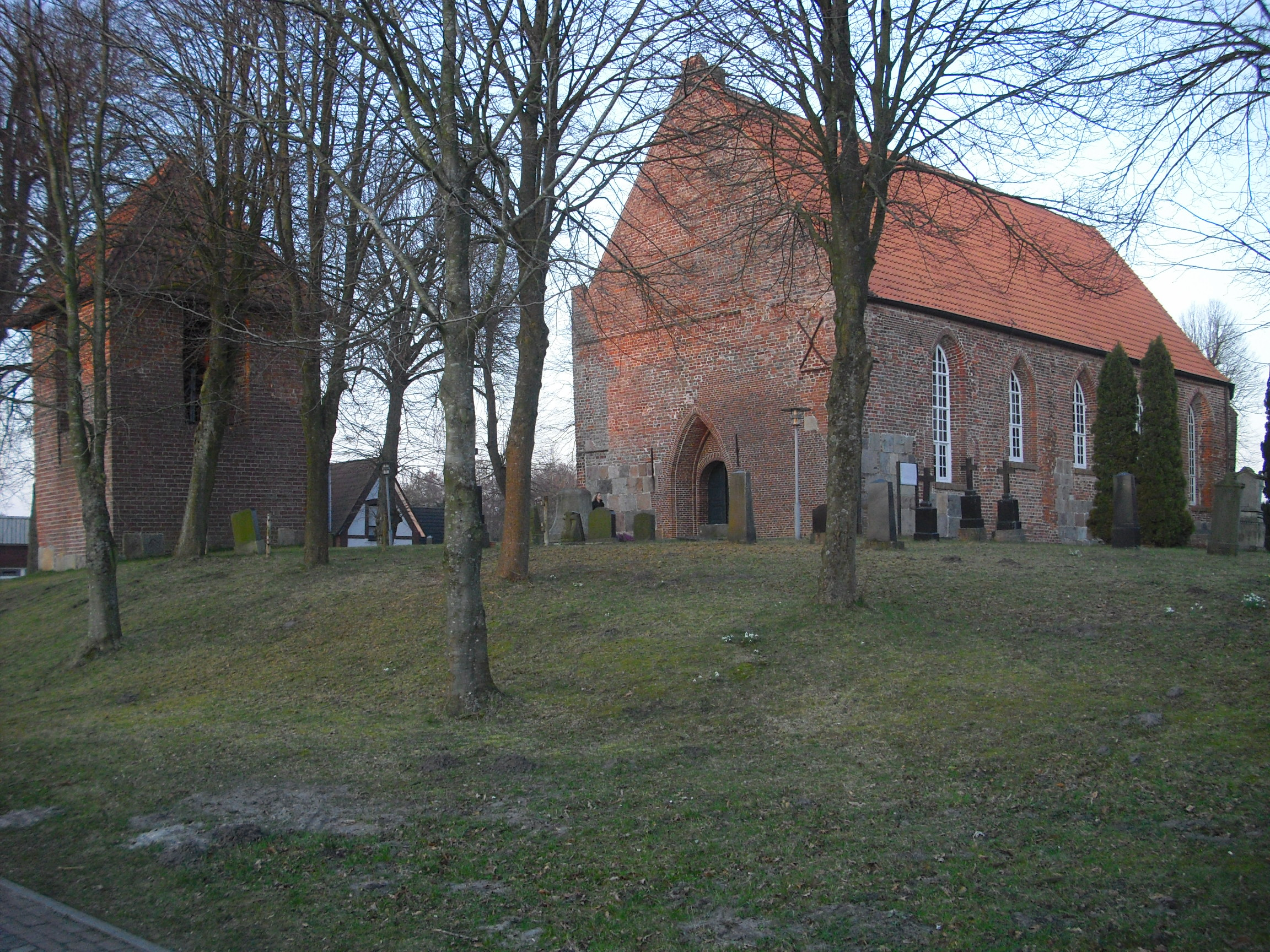 Cäcilien- und Margarethenkirchein Leerhafe